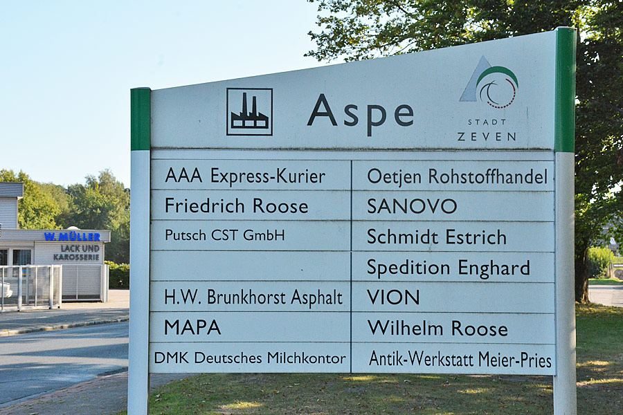 Zeven Aspe Firmen